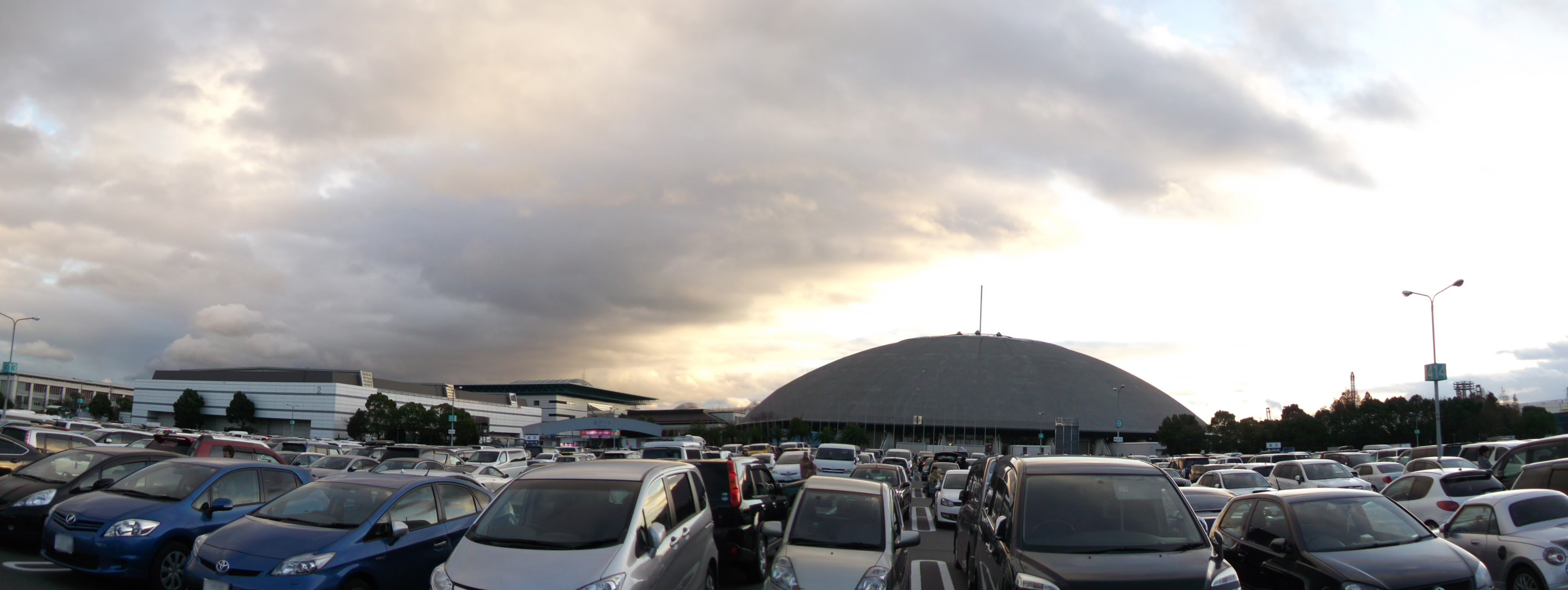 名古屋市港区金城ふ頭の名古屋市国際展示場駐車場